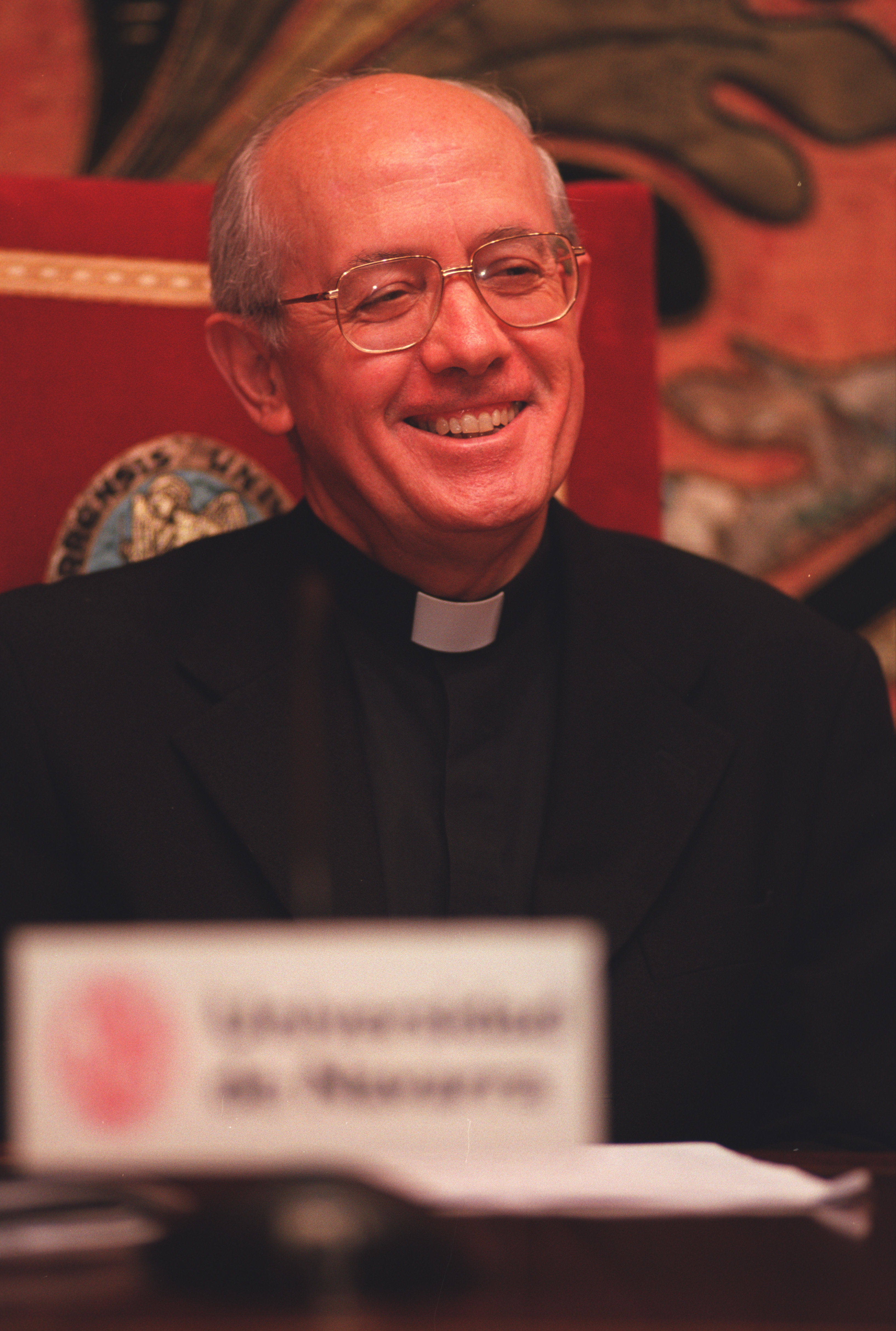 Presbítero español, presidente de Academia Pontificia de Santo Tomás de Aquino.